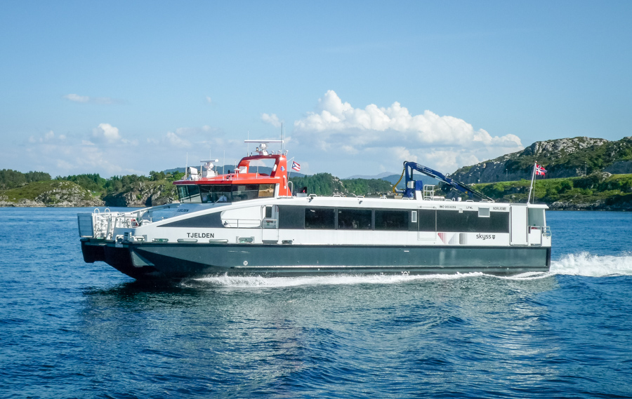 Tjelden i 2014. Tur til Møkster 2. pinsedag.